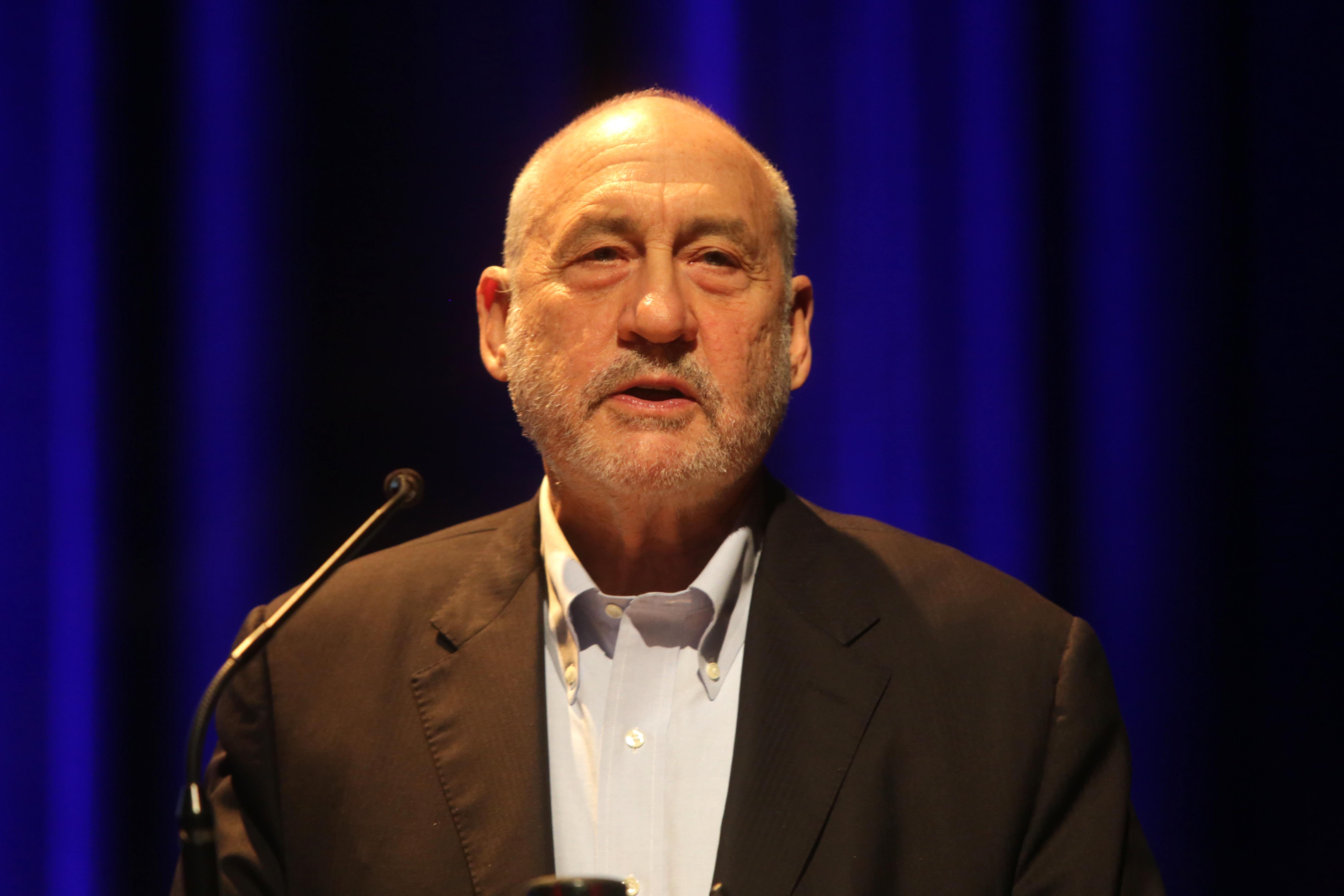 Conferência com Joseph Stiglitz, economista norte-americano, Nobel de Economia Data: 04 de novembro de 2015 Local: Teatro Cetip – São Paulo Crédito: Greg Salibian